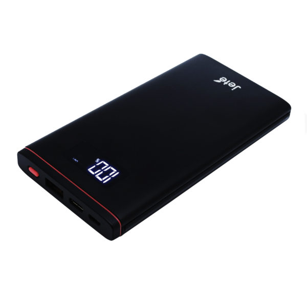 Power Bank Phantom 13000mAh